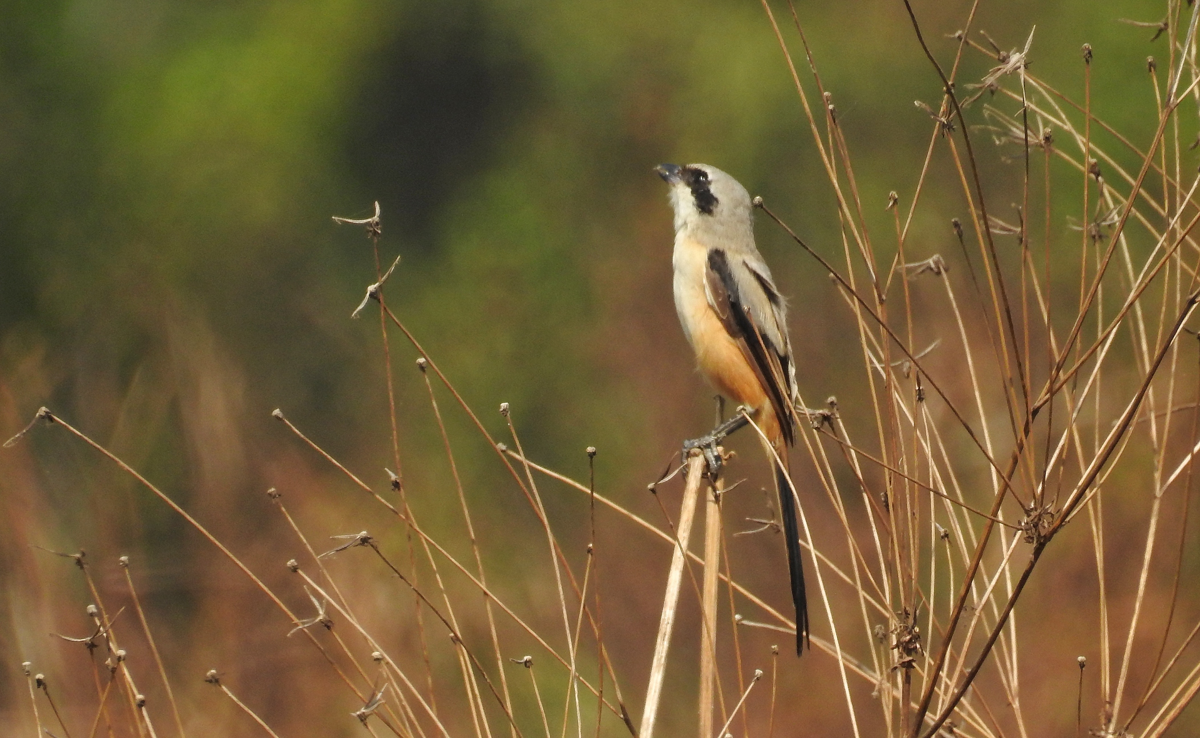 From kannur kattampally